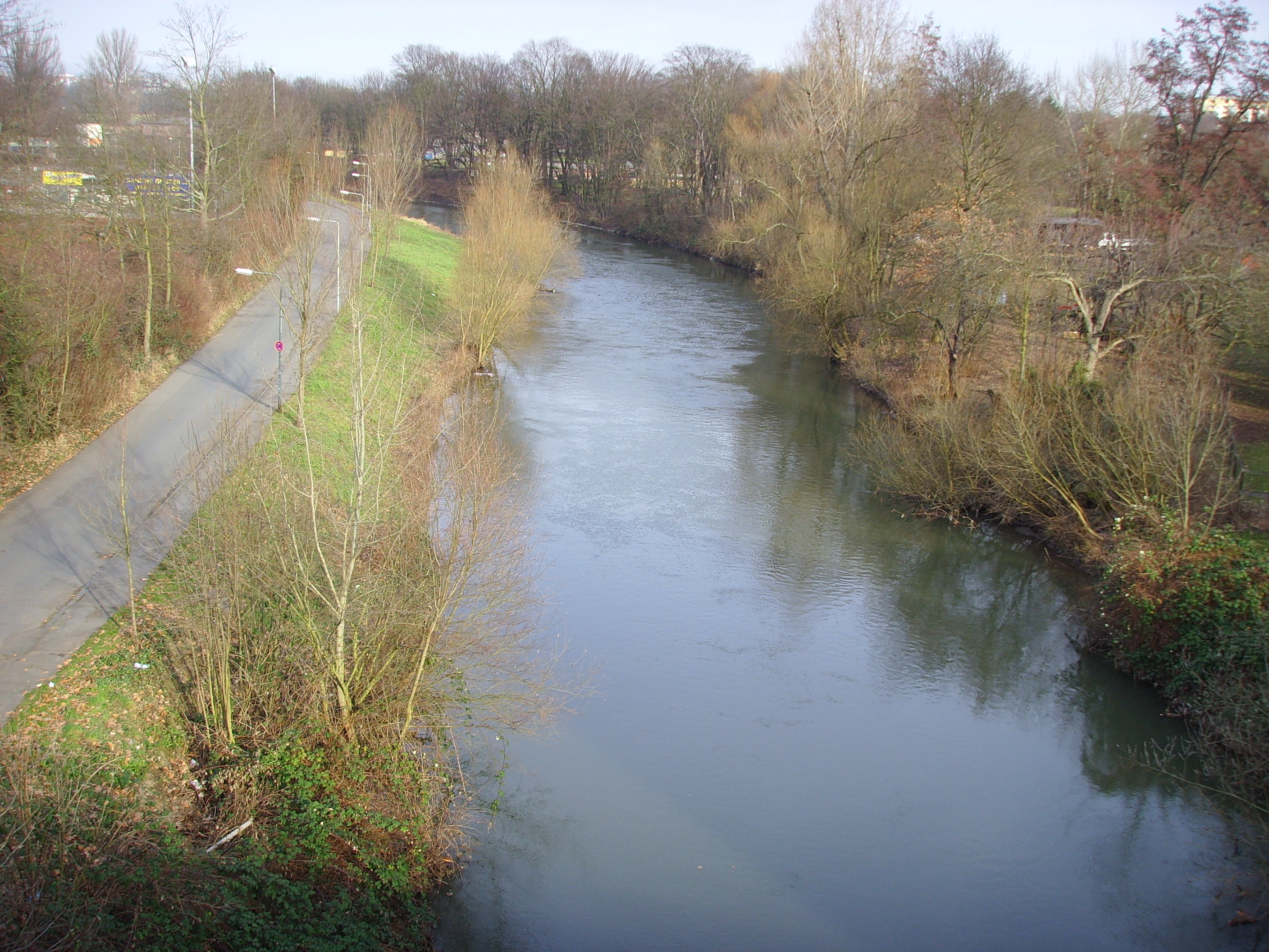 Nidda zwischen Frankfurt am Main-Heddernheim (links) und Eschersheim in Höhe Maybachbrücke